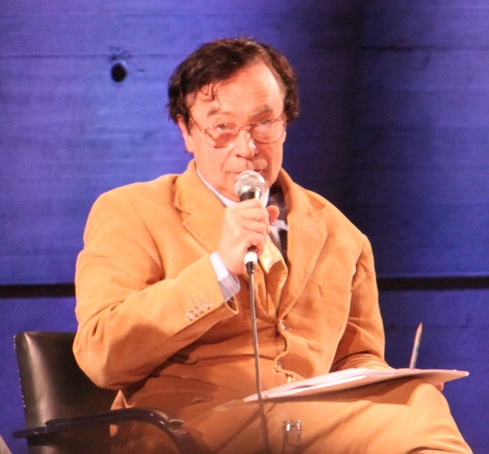 Université de la Terre (UNESCO) à Paris, le 2 avril 2011.